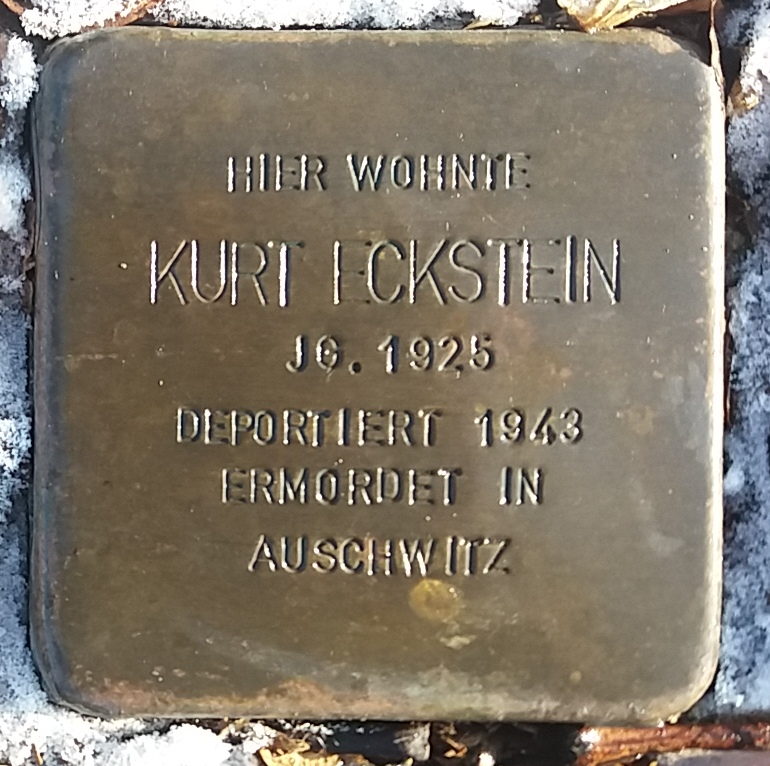 Stolperstein für Kurt Eckstein, Mitglied der Großfamilie Eckstein, Vöhringen (Iller)